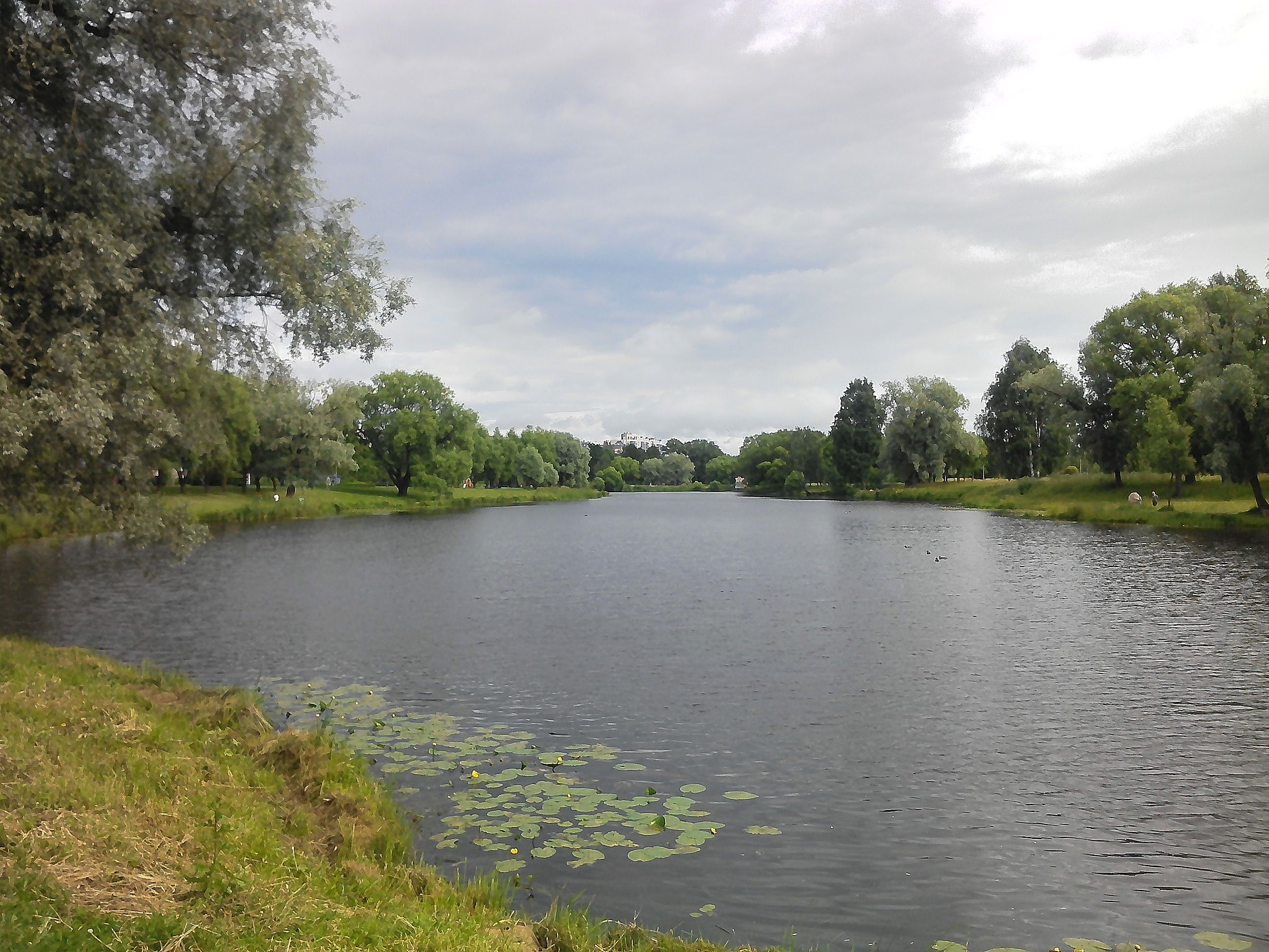 Разлив Муринского ручья